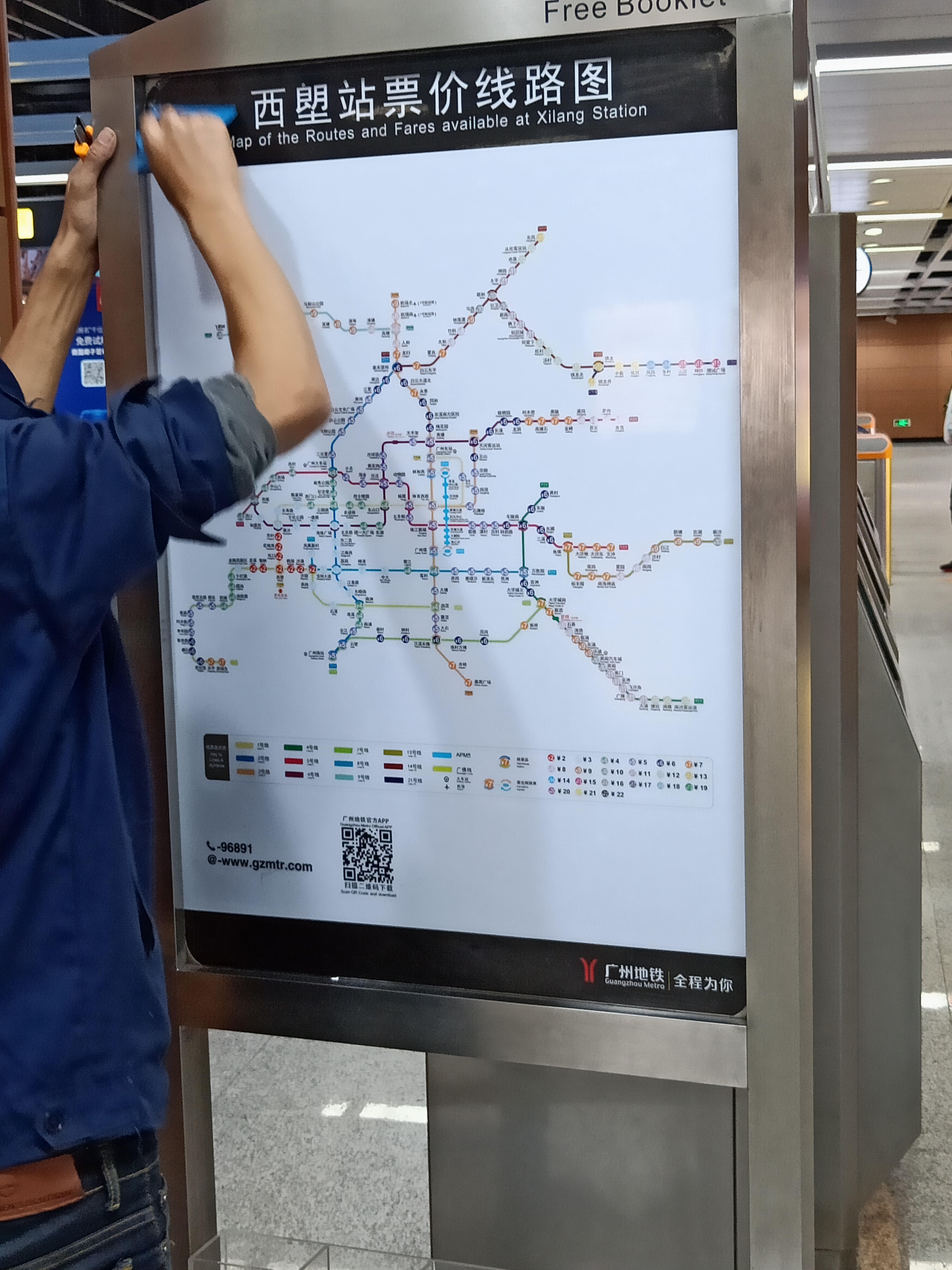 粵語: 2018年12月24號，西塱站嘅廣佛地鐵站廳嘅免費區入面，有工作人員啱換緊2018年版嘅票價路線圖，發現原先「西朗」兩字亦改返「西塱」。